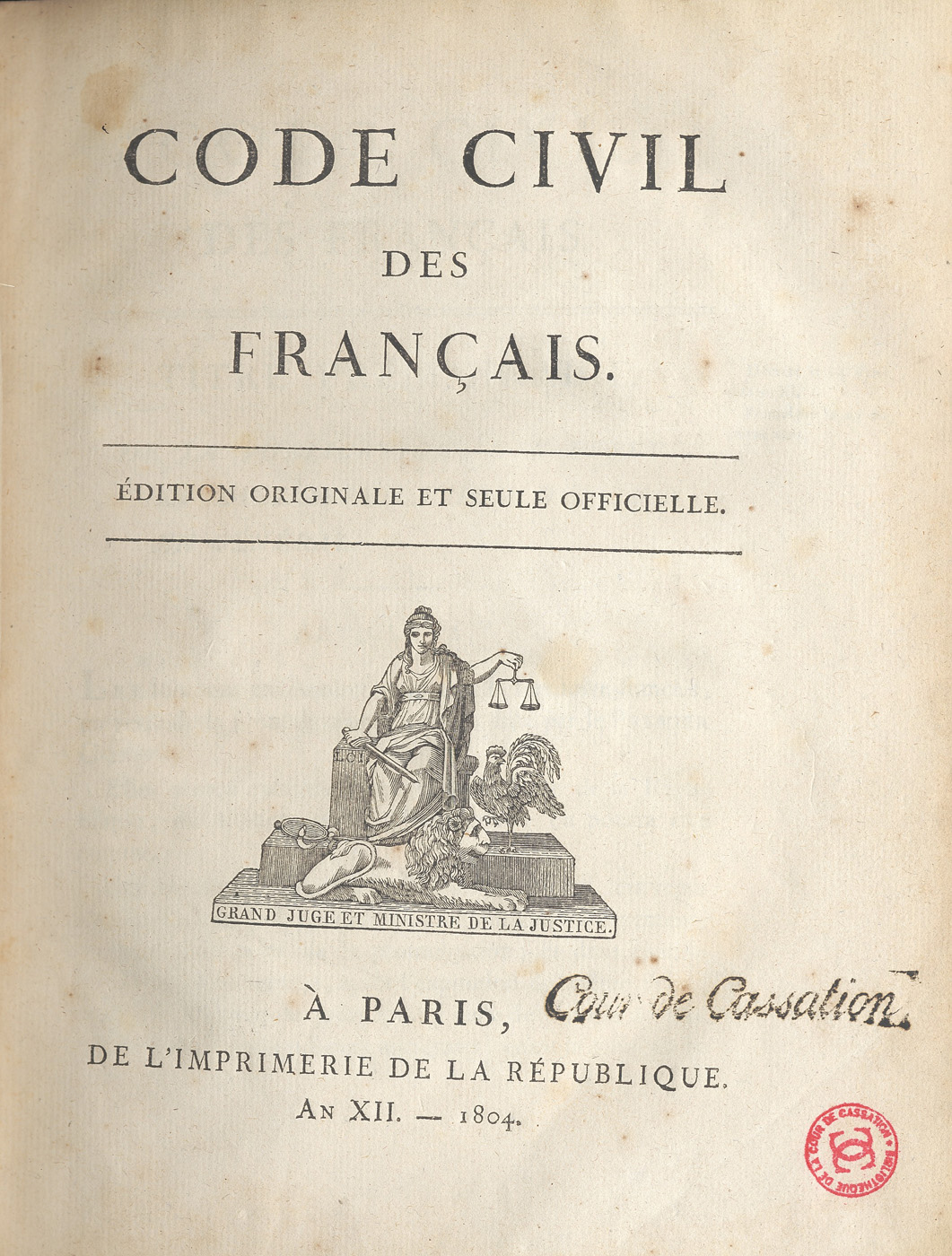 Code civil des Français. Edition originale et seule officielle